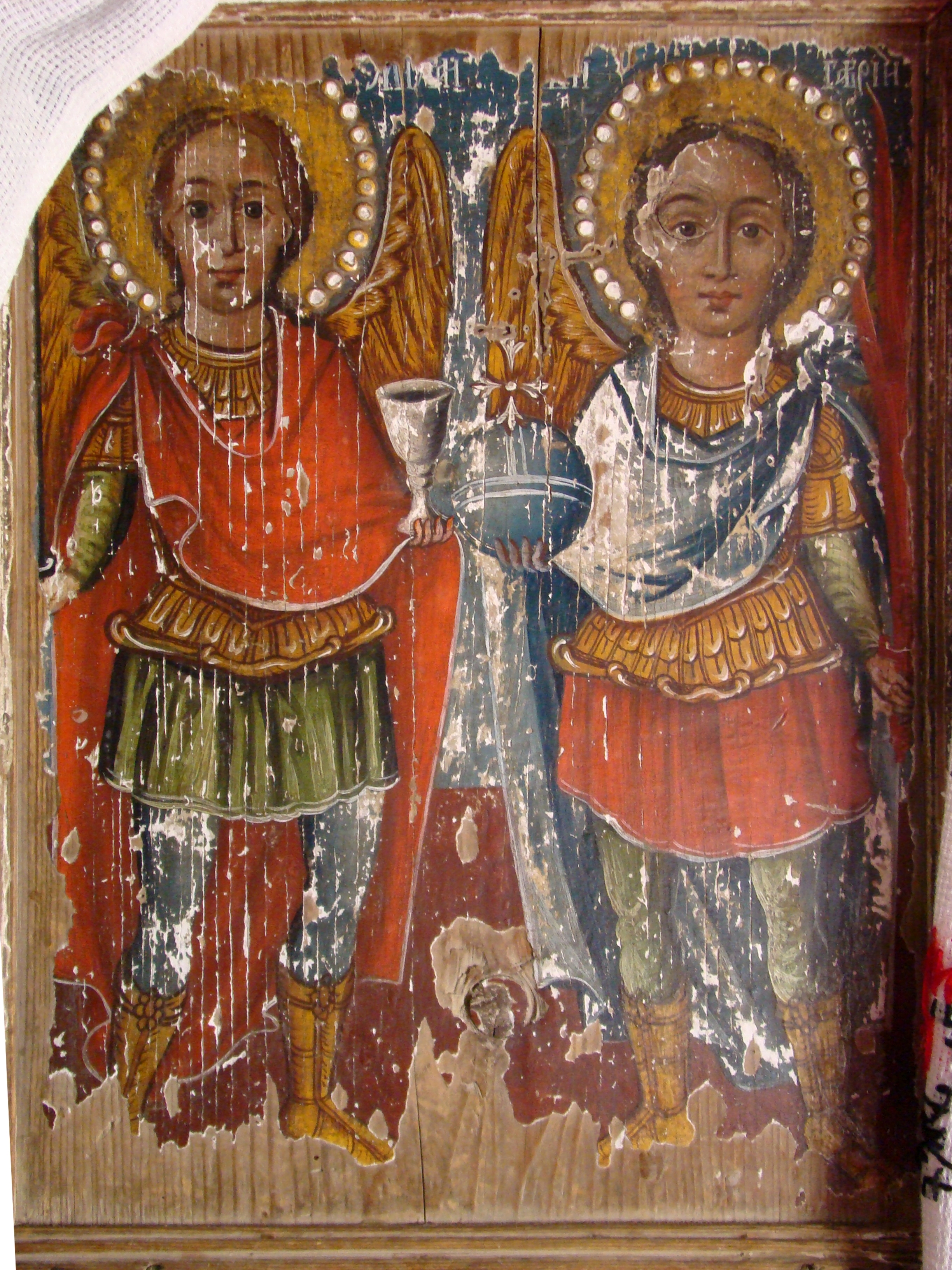 Dealu Geoagiului, județul Alba